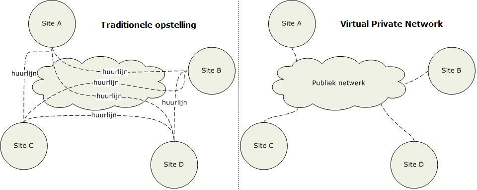 Vergelijking tussen een traditionele WAN en één waar VPN gebruikt wordt.